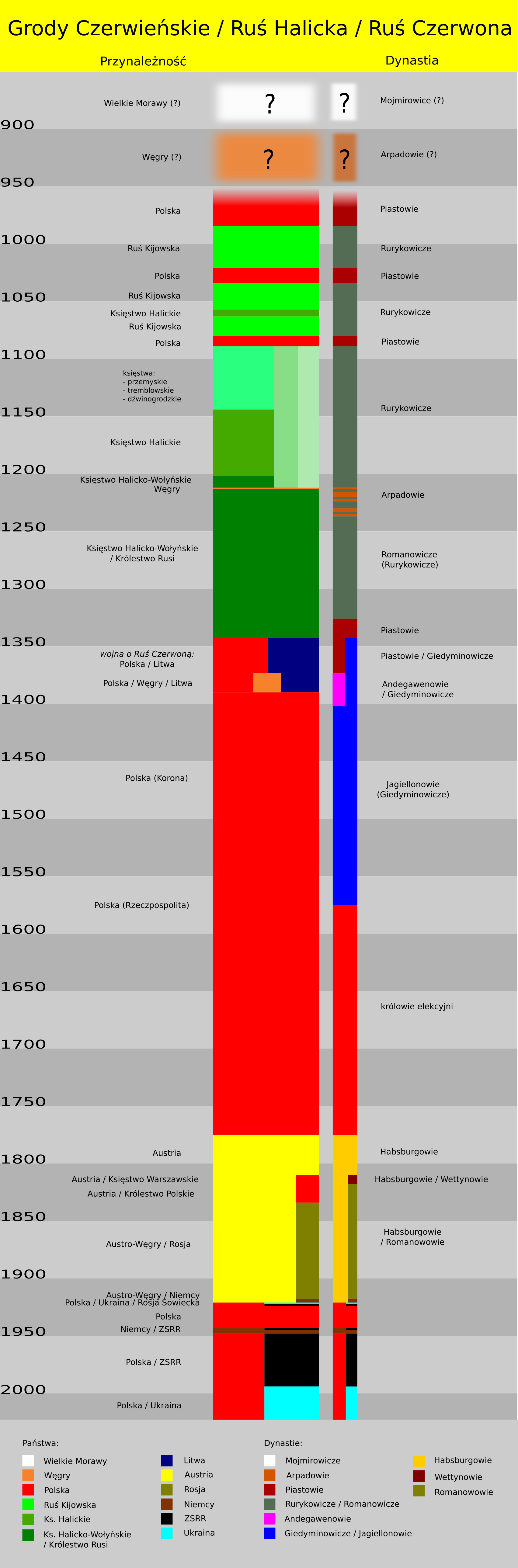 Przynależność Grodów Czerwieńskich / Rusi Czerwonej